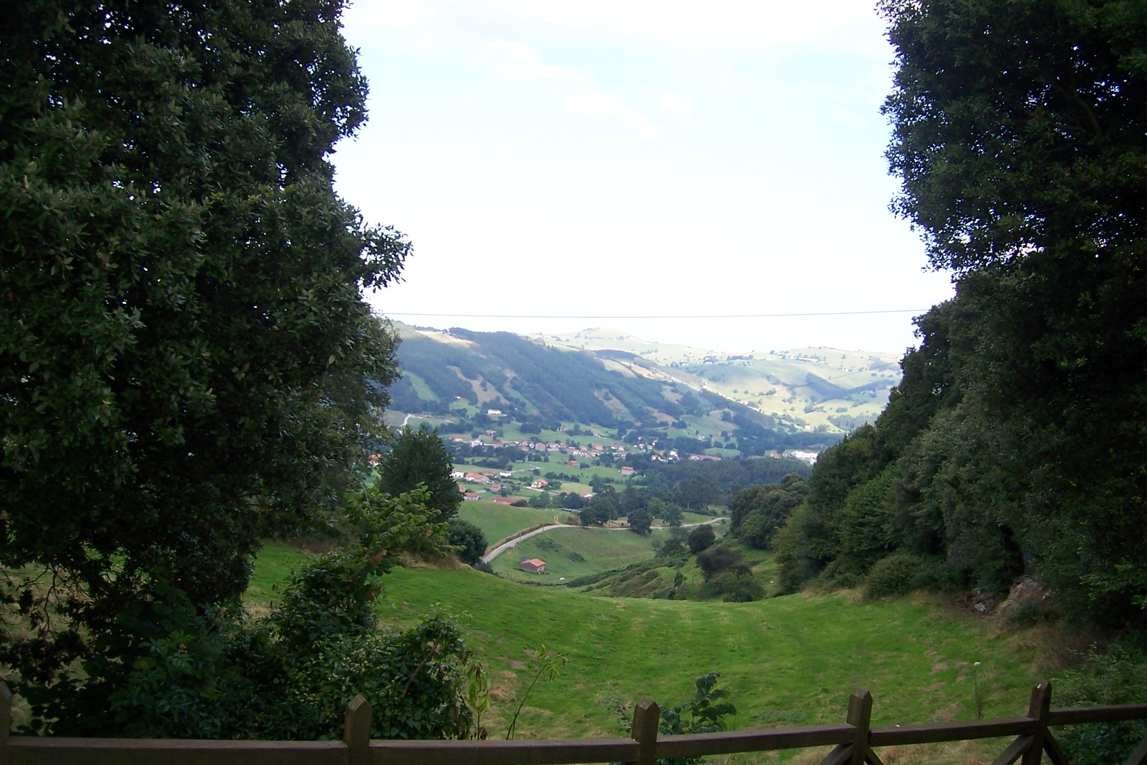 Localidad de Garzón en Solórzano (Cantabria, España). Paisaje.